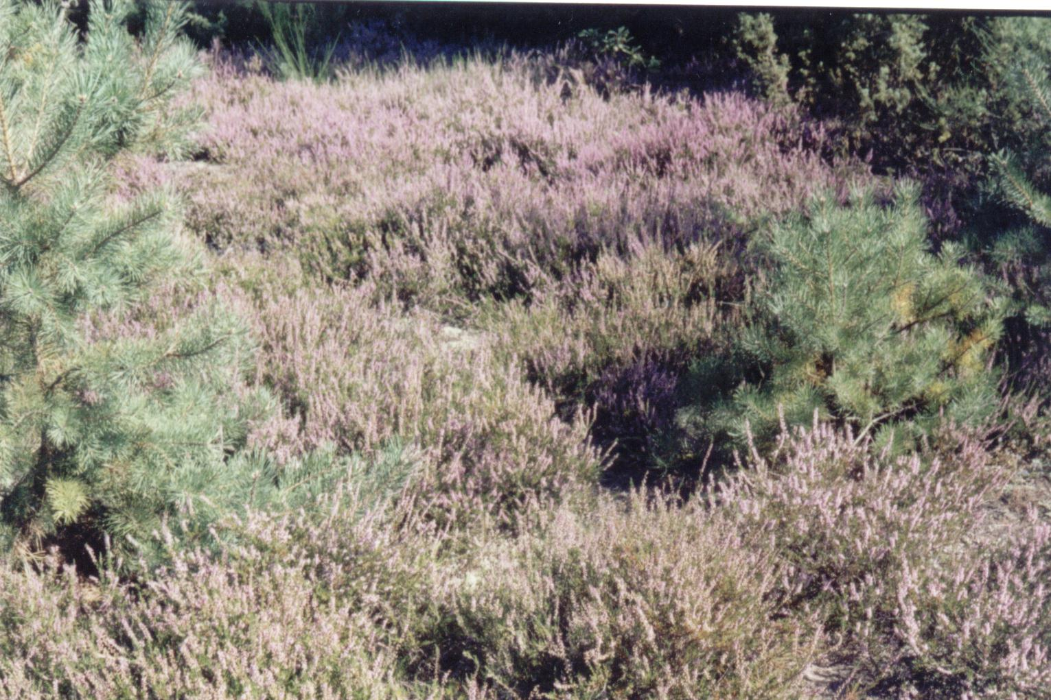 Wrzos na poligonie wojskowym w Raduczu